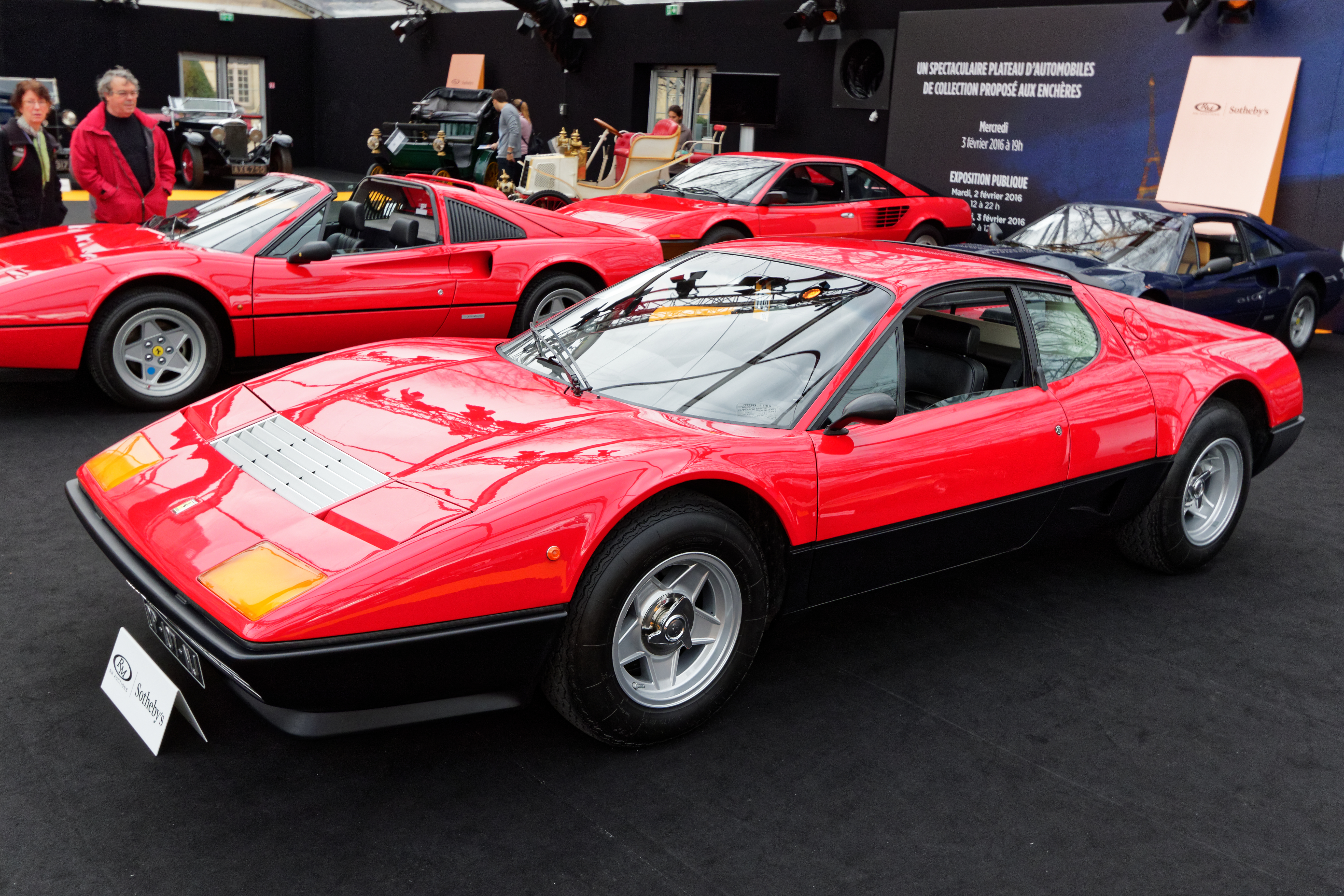 Une Ferrari 512 BB de 1977 exposée lors de la vente RM Sotheby’s 2016 aux Invalides à Paris.